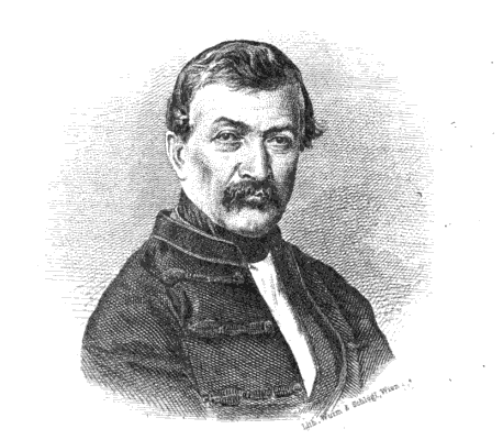 Samo Chalupka portrait